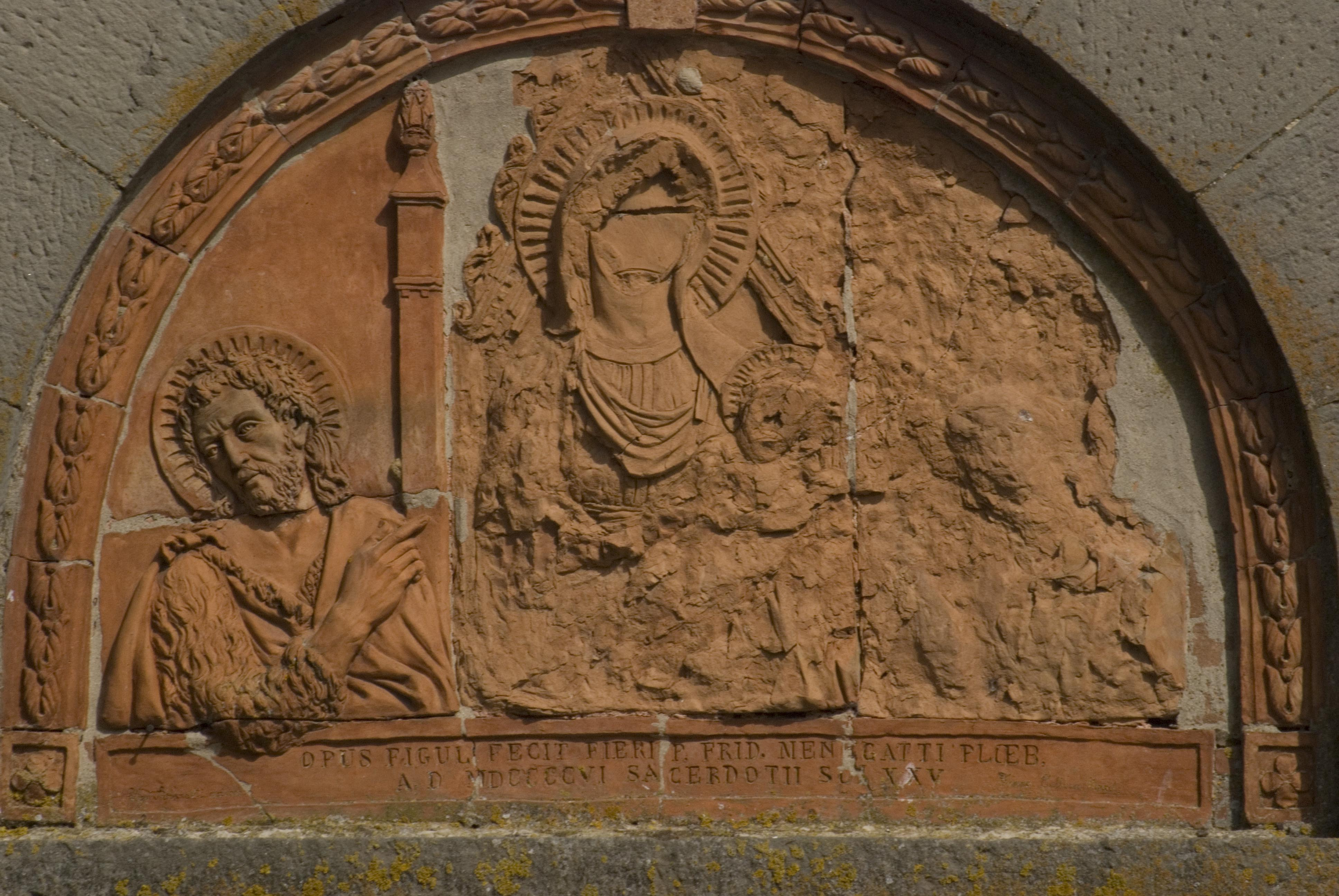 Pieve di San Giovanni in Sugana (particolare)